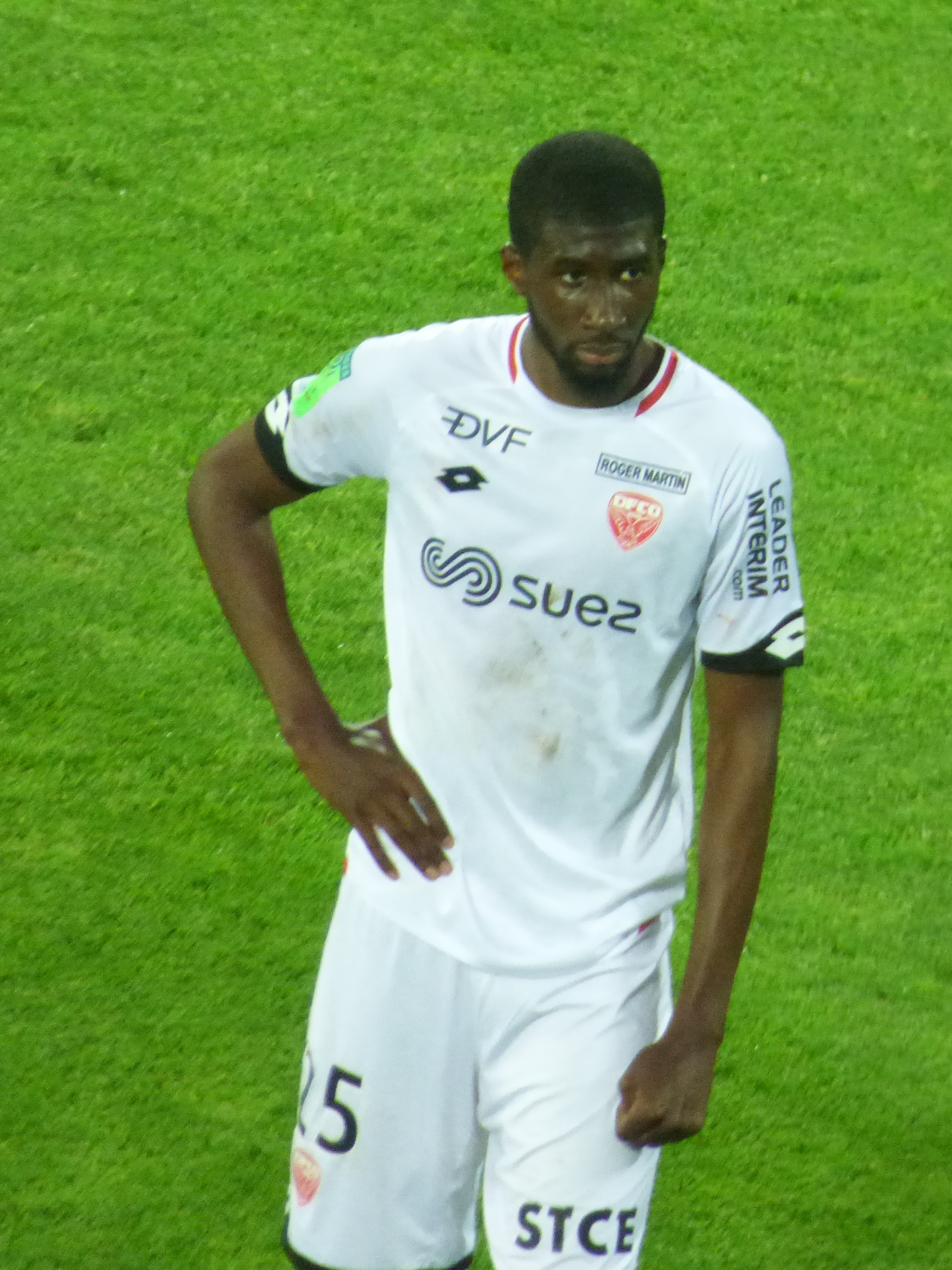 Senou Coulibaly pendant le match RC Lens / Dijon FCO, match aller des barrages pour la montée en Ligue 1 2018-2019, le 30 juin 2019, au Stade Bollaert-Delelis.